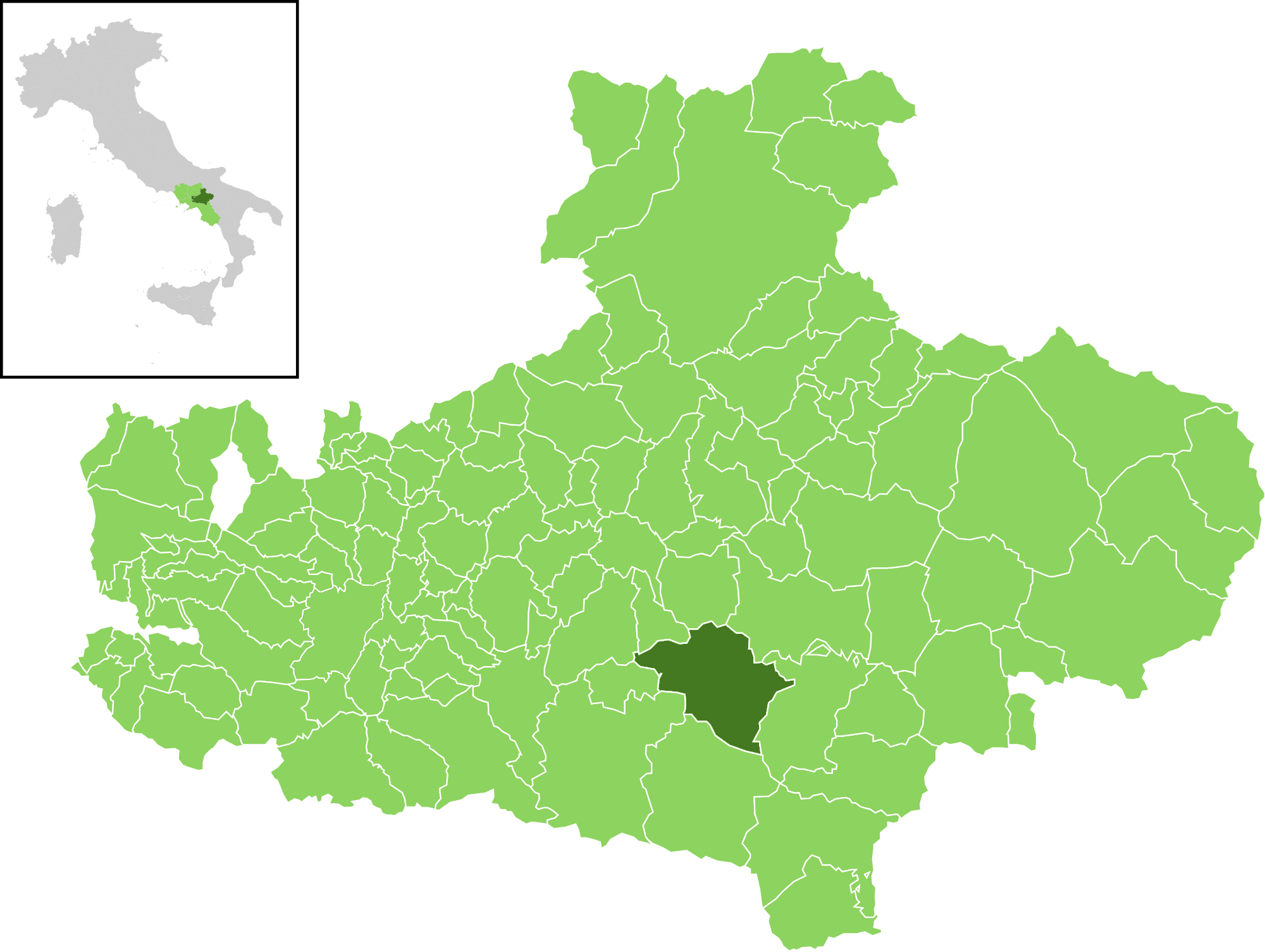 Posizione del comune all'interno della provincia di Avellino